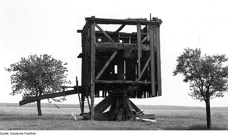 Original image description from the Deutsche Fotothek Löbnitz-Roitzschjora. Bockmühle, Ruine